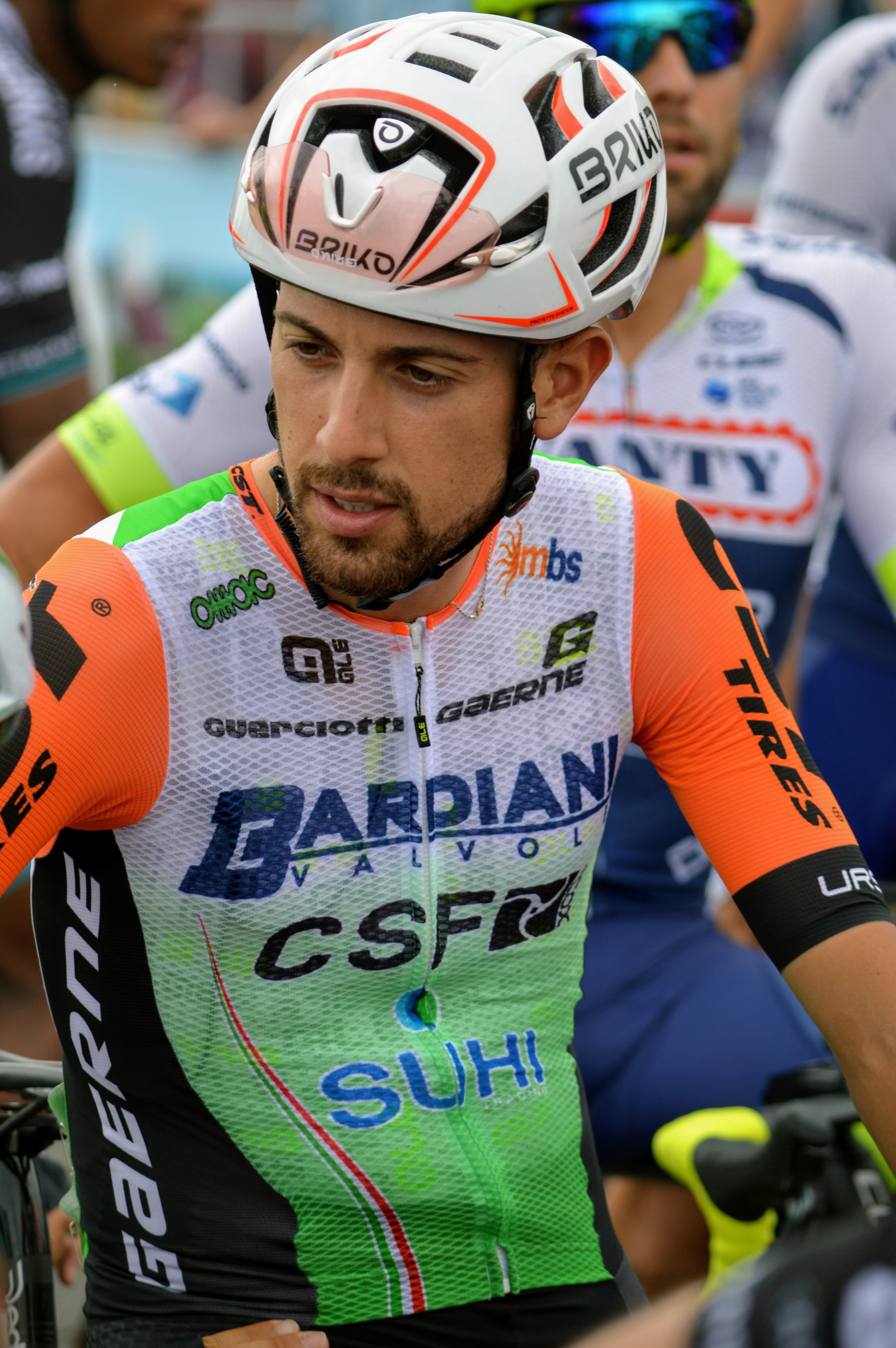 Giovanni CARBONI - Août 2019 sur le Tour Poitou-Charentes